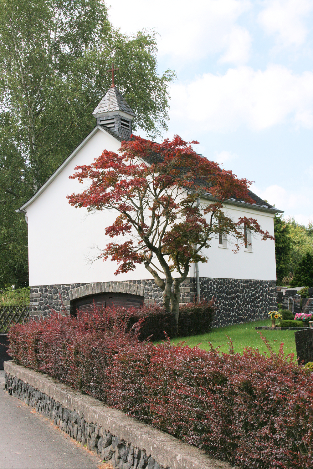 Vettelschoß, Friedhofkapelle